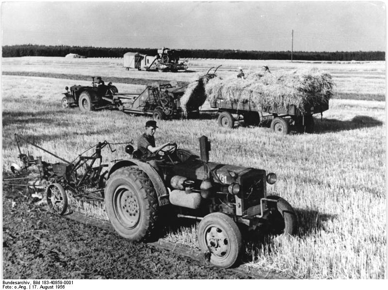 Stolzenhain, Ernte, Nachbearbeitung Zentralbild Lausitzer Rundschau 17.8.1956 Ernte im Fließsystem Schnell, verlustlos und billig wird die Ernte eingebracht, wenn nach dem Fließsystem gearbeitet wird. UBz: Während Mähdrescherfahrer Chulik von der MTS Ahlsdorf, Kreis Herzberg, auf einem Roggenschlag der LPG Stolzenhain die letzten Halme schneidet, hat die Sammelpresse die grösste Hälfte des Feldes vom Stroh geräumt und der Schälpflug ein Stück des Ackers "schwarzgemacht", damit wenige Zeit danach die Zwischenfrucht eingedrillt werden kann.